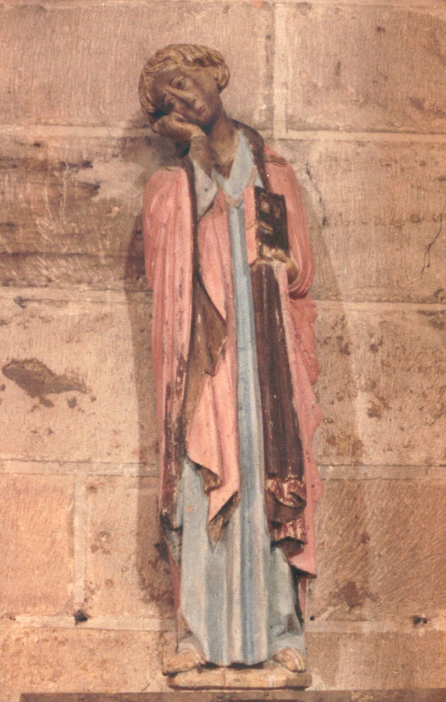 San Juan Evangelista, ermita de Reveche (Gumiel de Izán, Burgos, España)